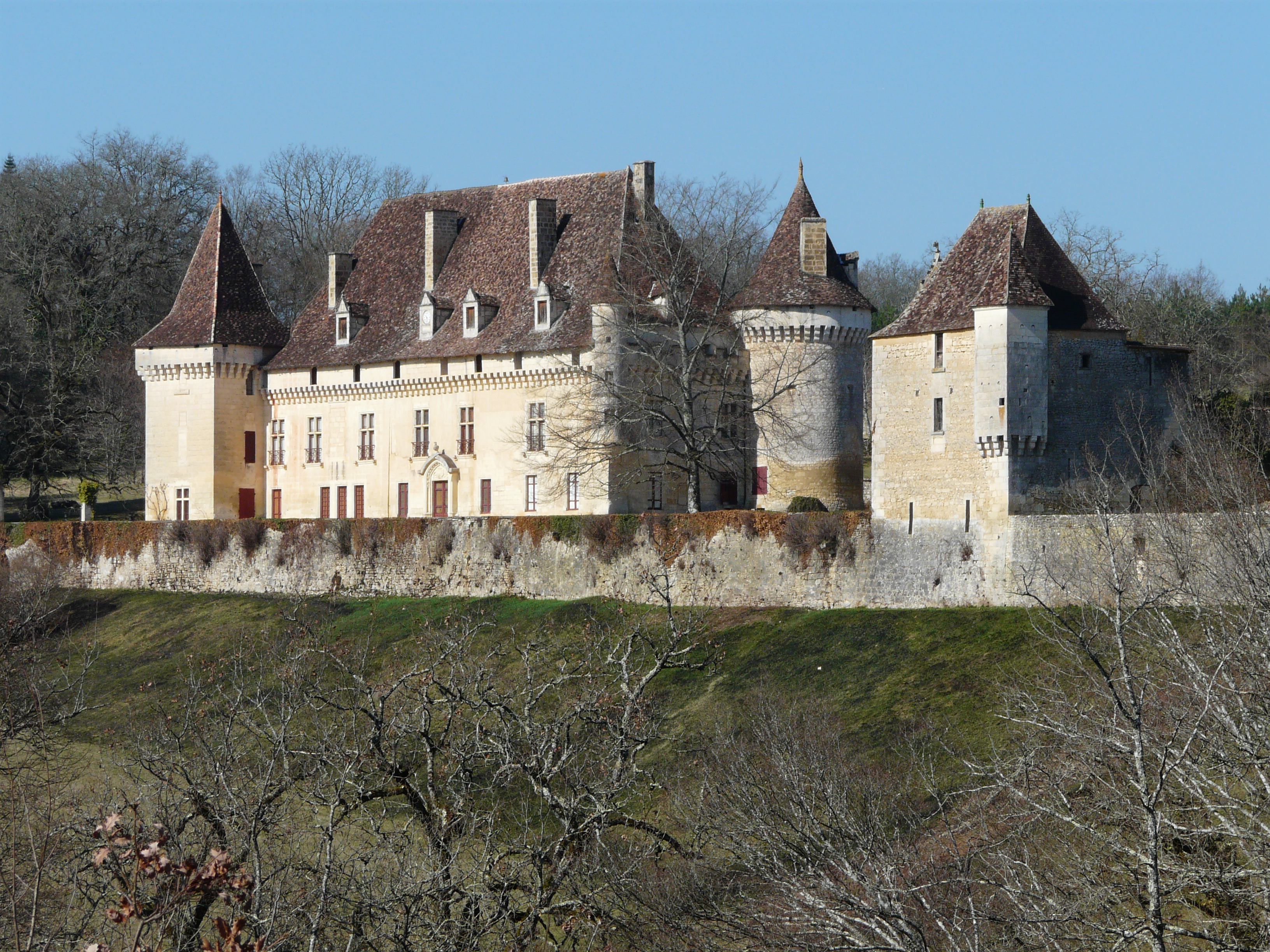 Le château de la Gaubertie vu depuis l'est, Saint-Martin-des-Combes, Dordogne, France.